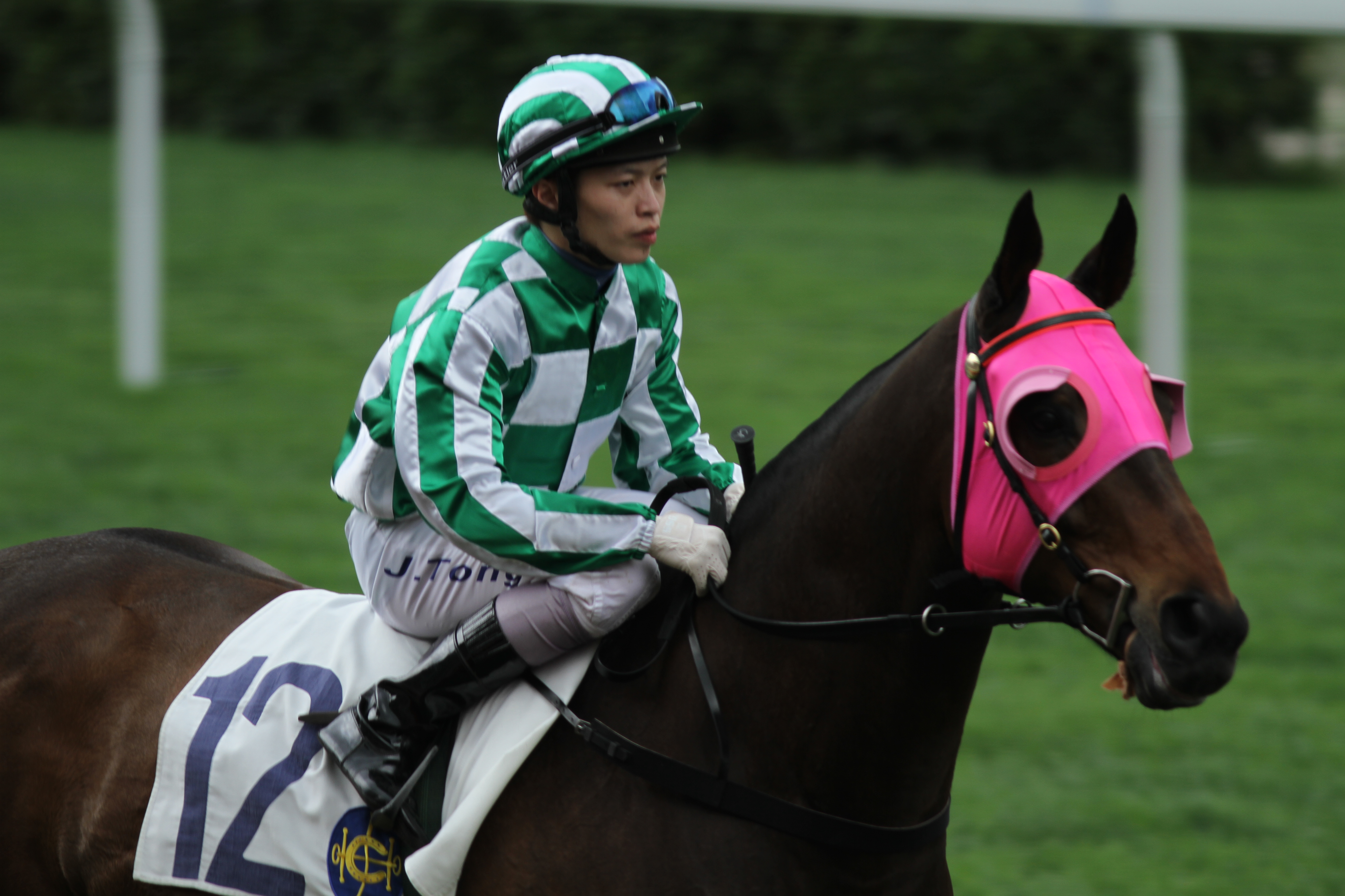 中文（香港）: 香港騎師湯智傑，攝於沙田馬場